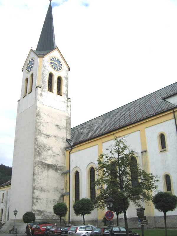 St. Peter und Paul, Oberstaufen im Allgaeu